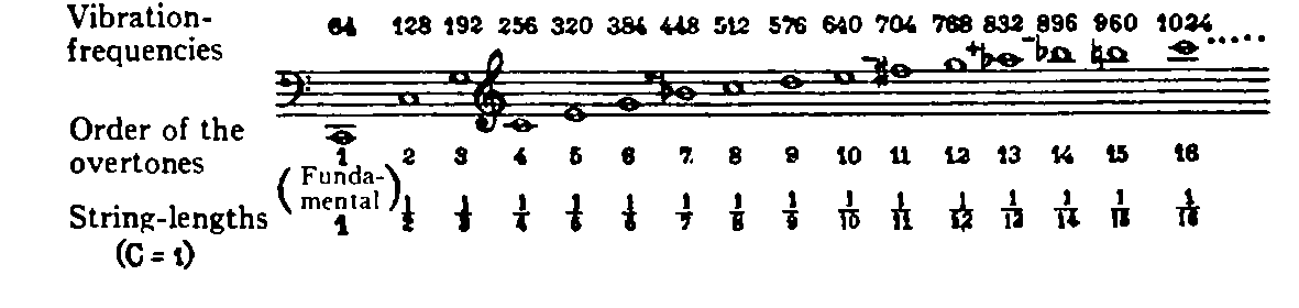 SerieArmonicos